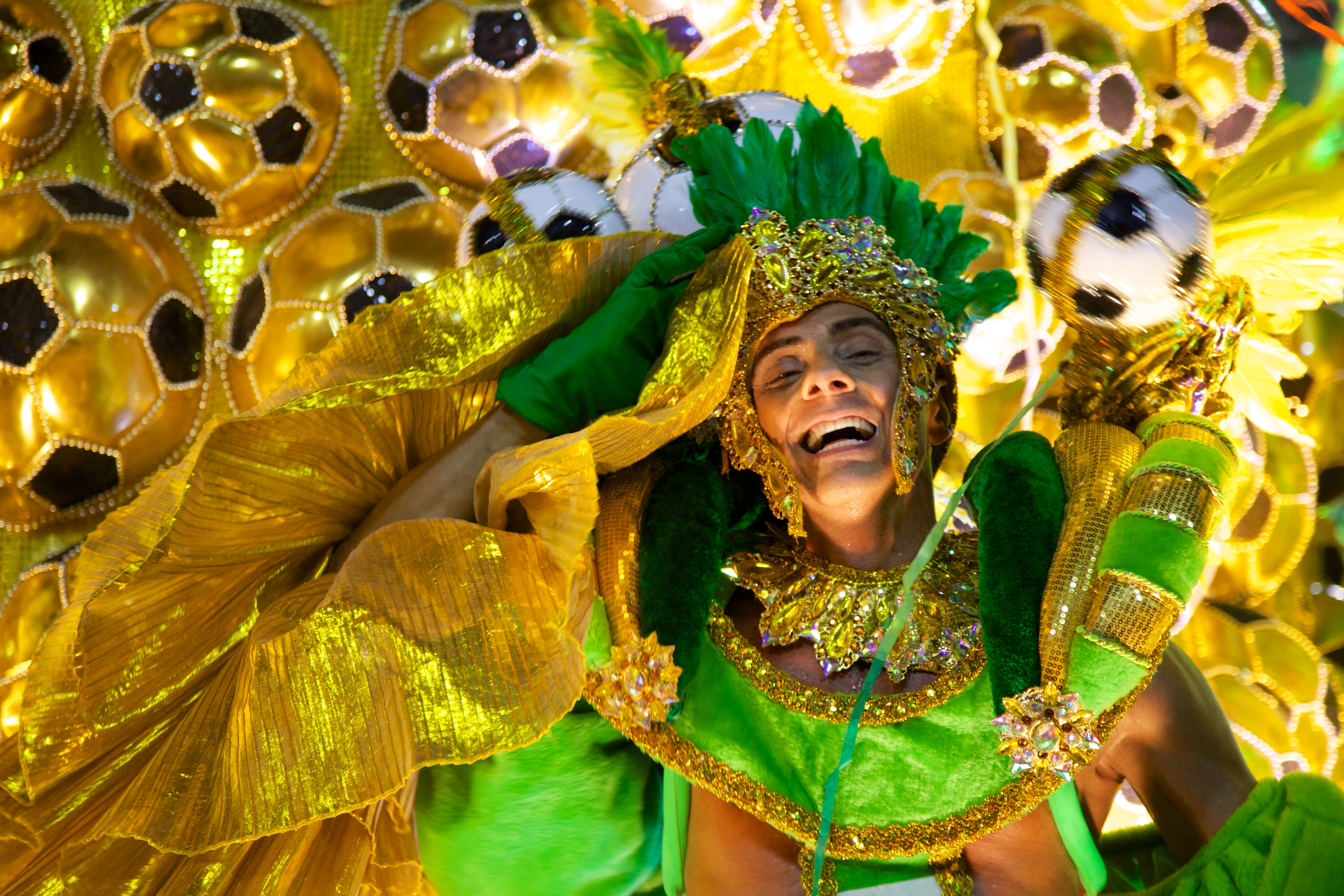 Carnaval 2014 no Sambadrome Marquês de Sapucaí no Rio de Janeiro, Brasil.